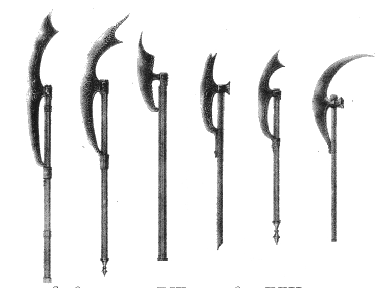 Русское вооружение с XIV до половины XVII столетия. Бердыши.